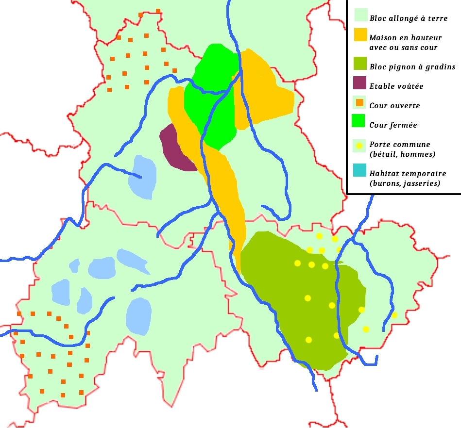 Forme des maisons en Auvergne d'après A. Poitrineau (1999) et par J.-R. Trochet (2006)